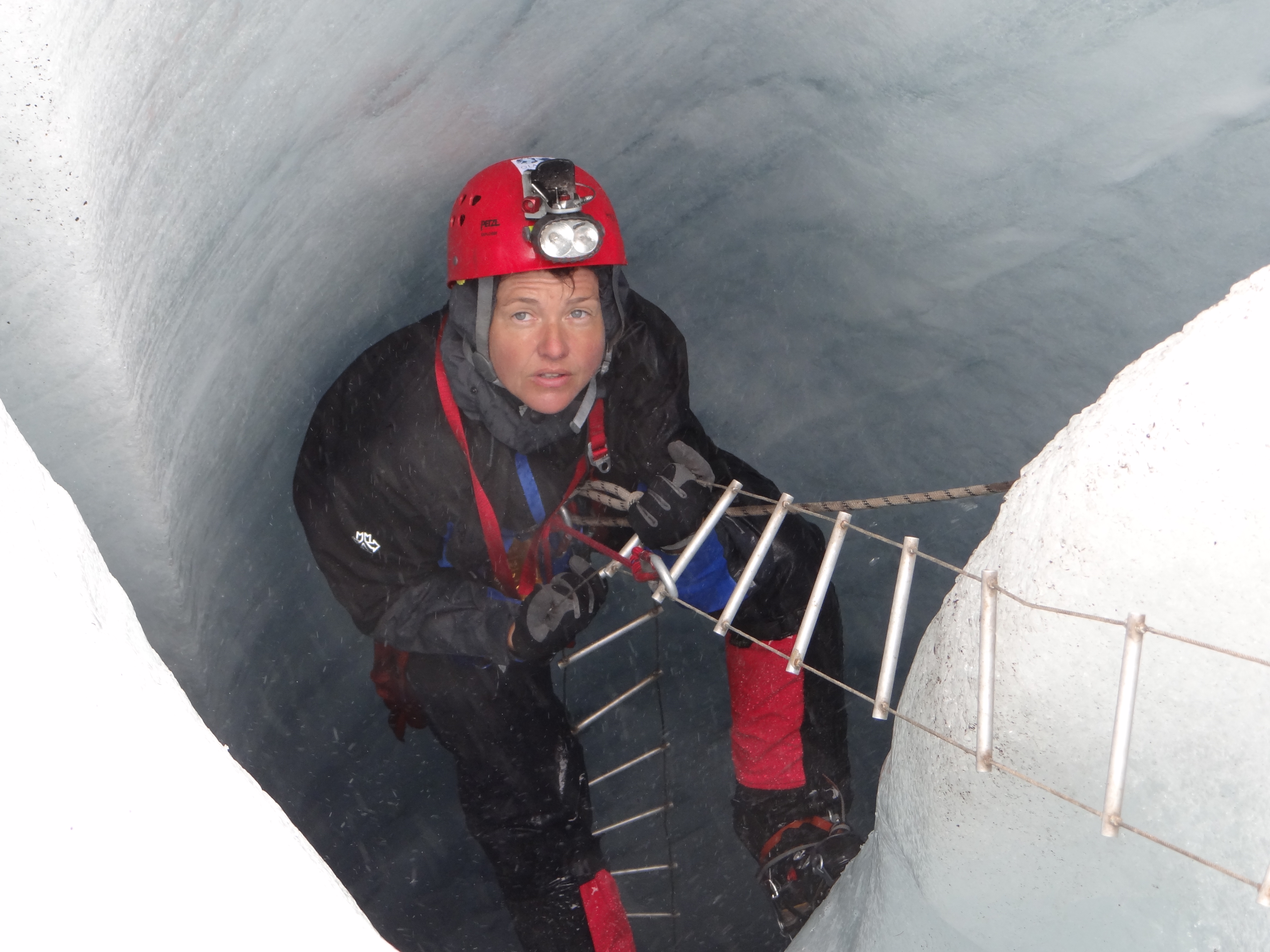 Karmenka explorando el drenaje glaciar